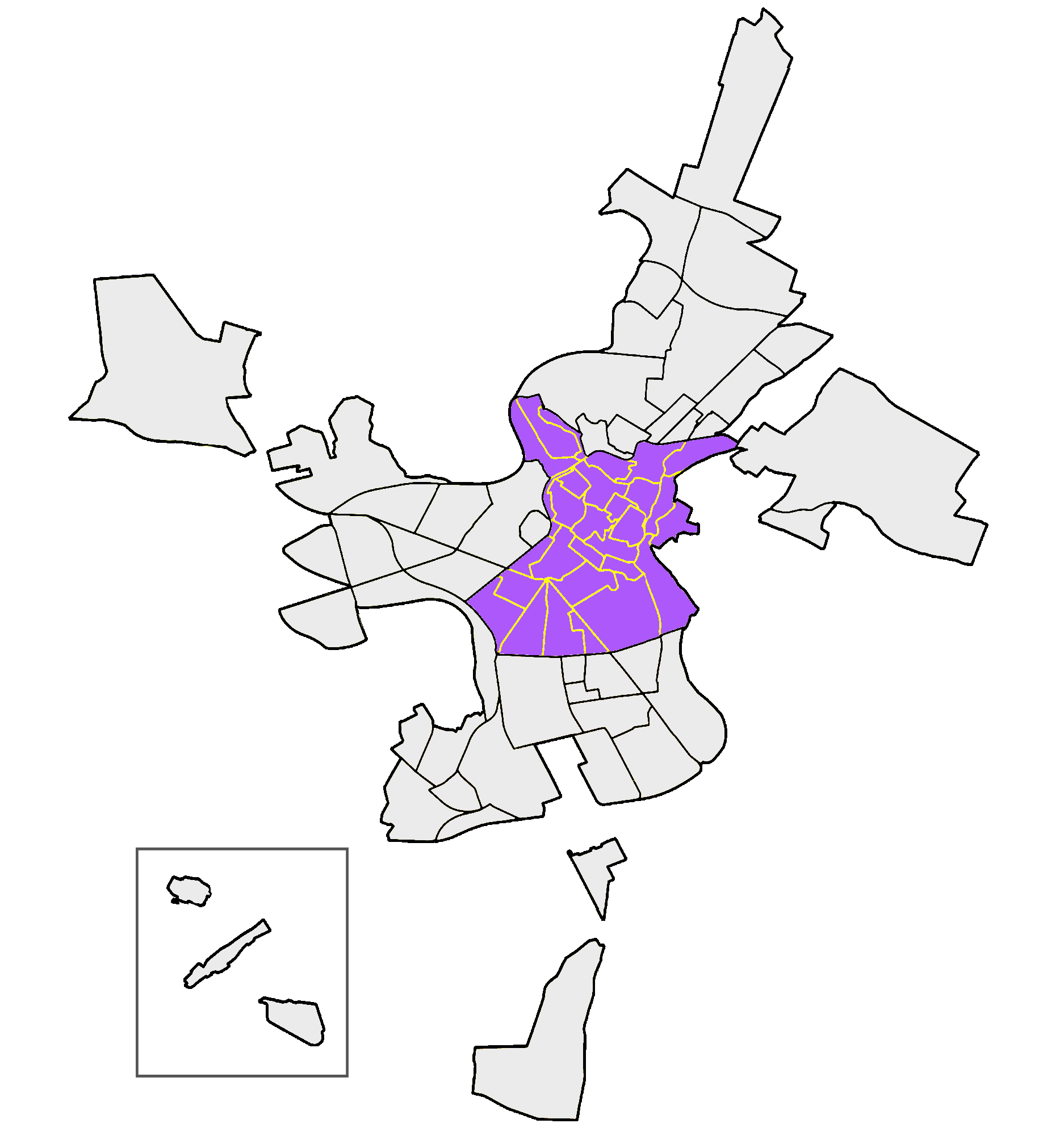 Distrito Centro-Casco Antiguo Cáceres